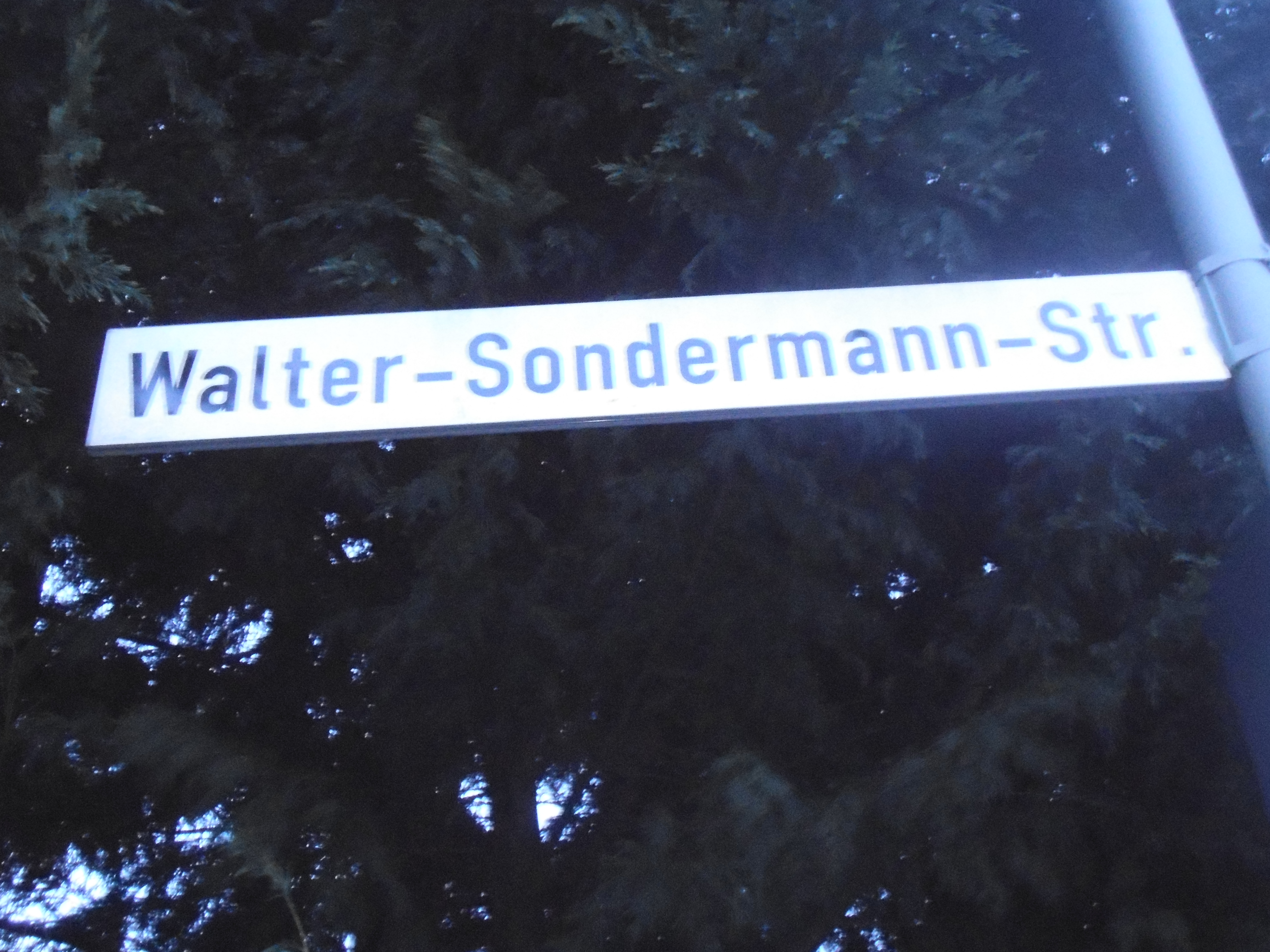 Straßenschild in einem Neubaugebiet am oberen Strückerberg in Ennepetal-Büttenberg. Die Straße ist nach einem ehemaligen Bürgermeister Ennepetals benannt.